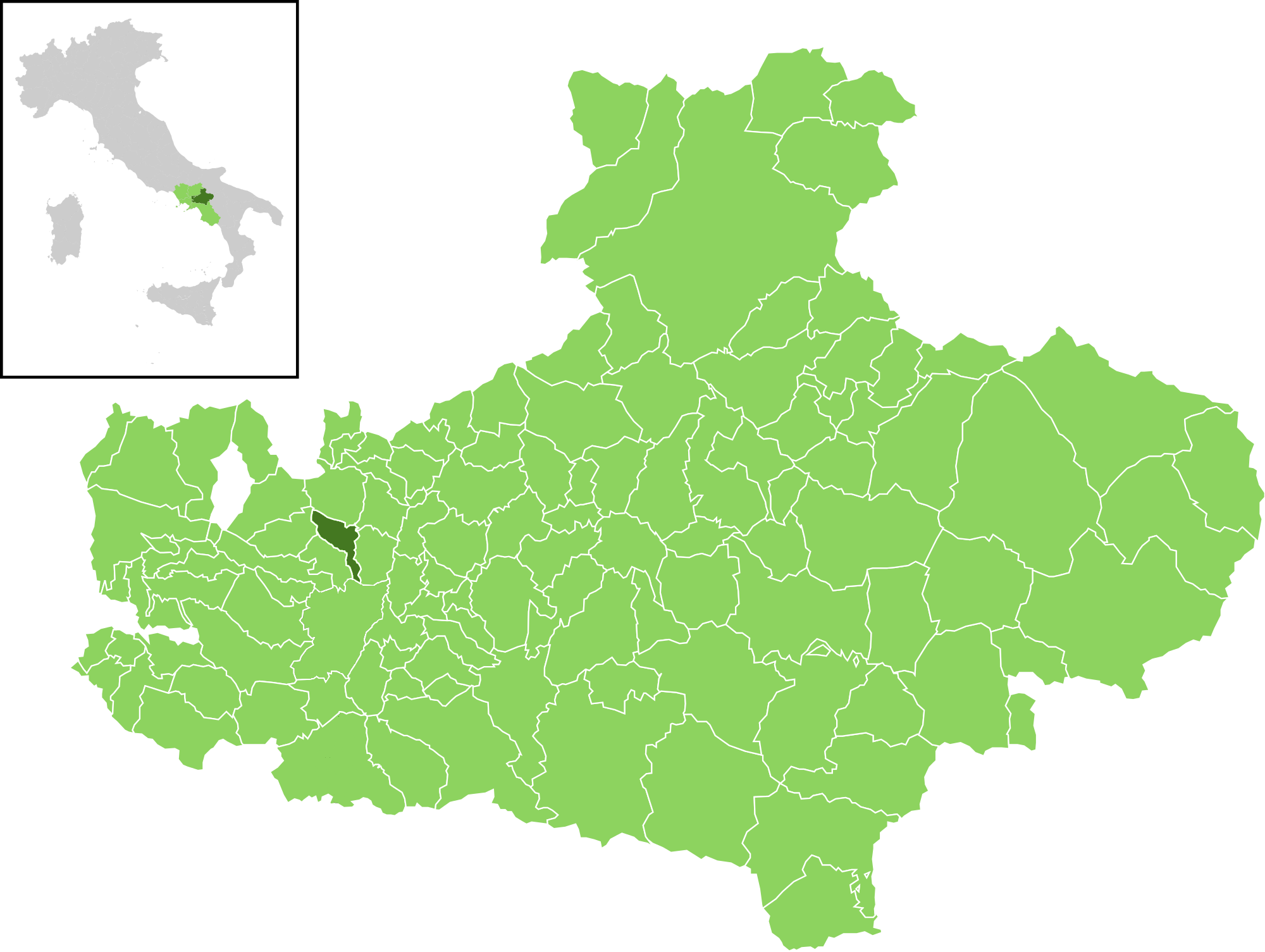 Il comune all'interno della provincia di Avellino